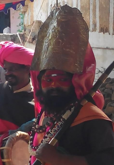 కాటుకతో కాటిపాపడు